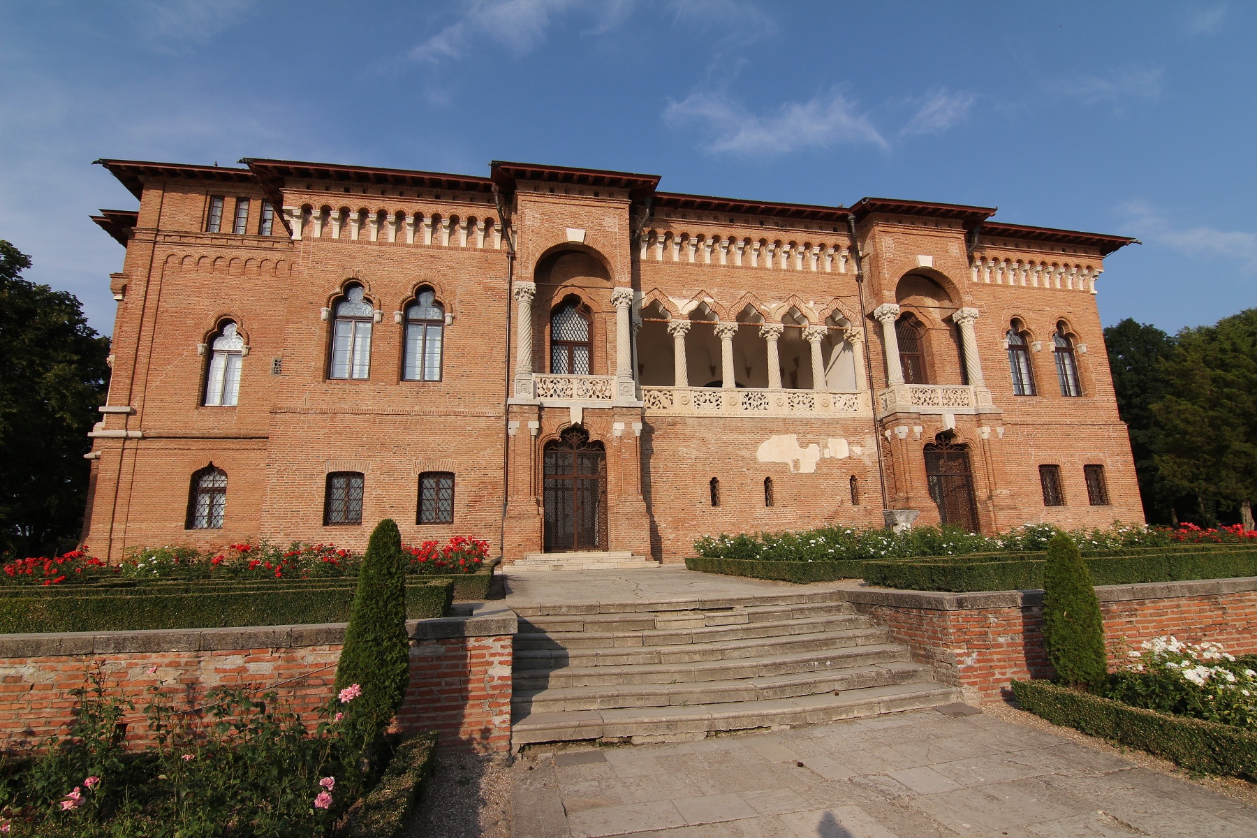 Palat 01